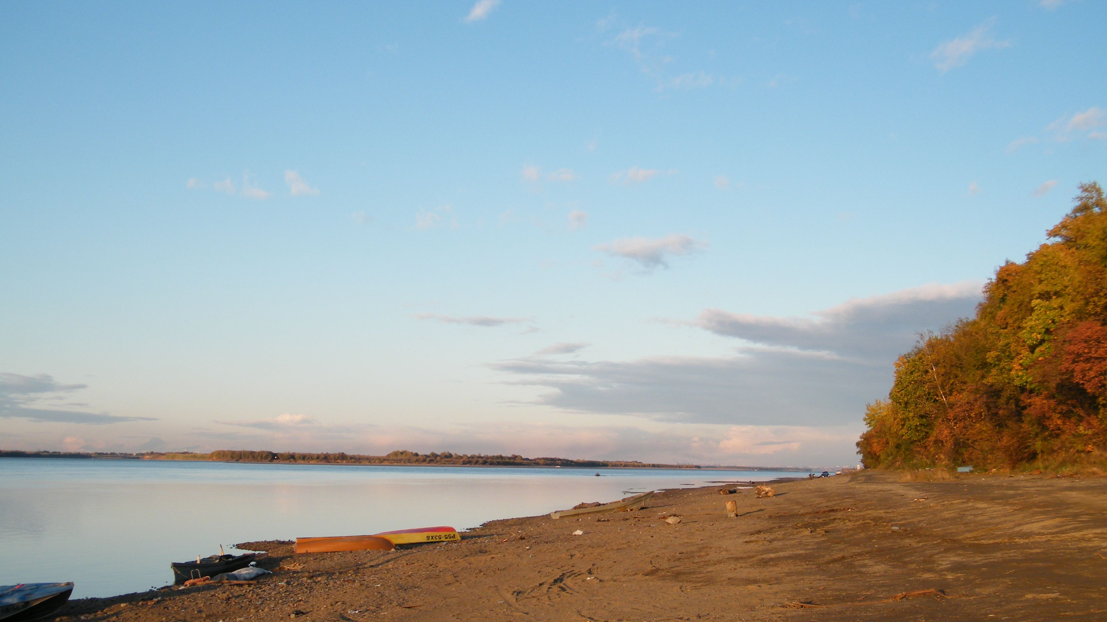 Амурская протока